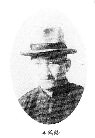 吴鹤龄 (乌尼伯英) (1896 - 1980)